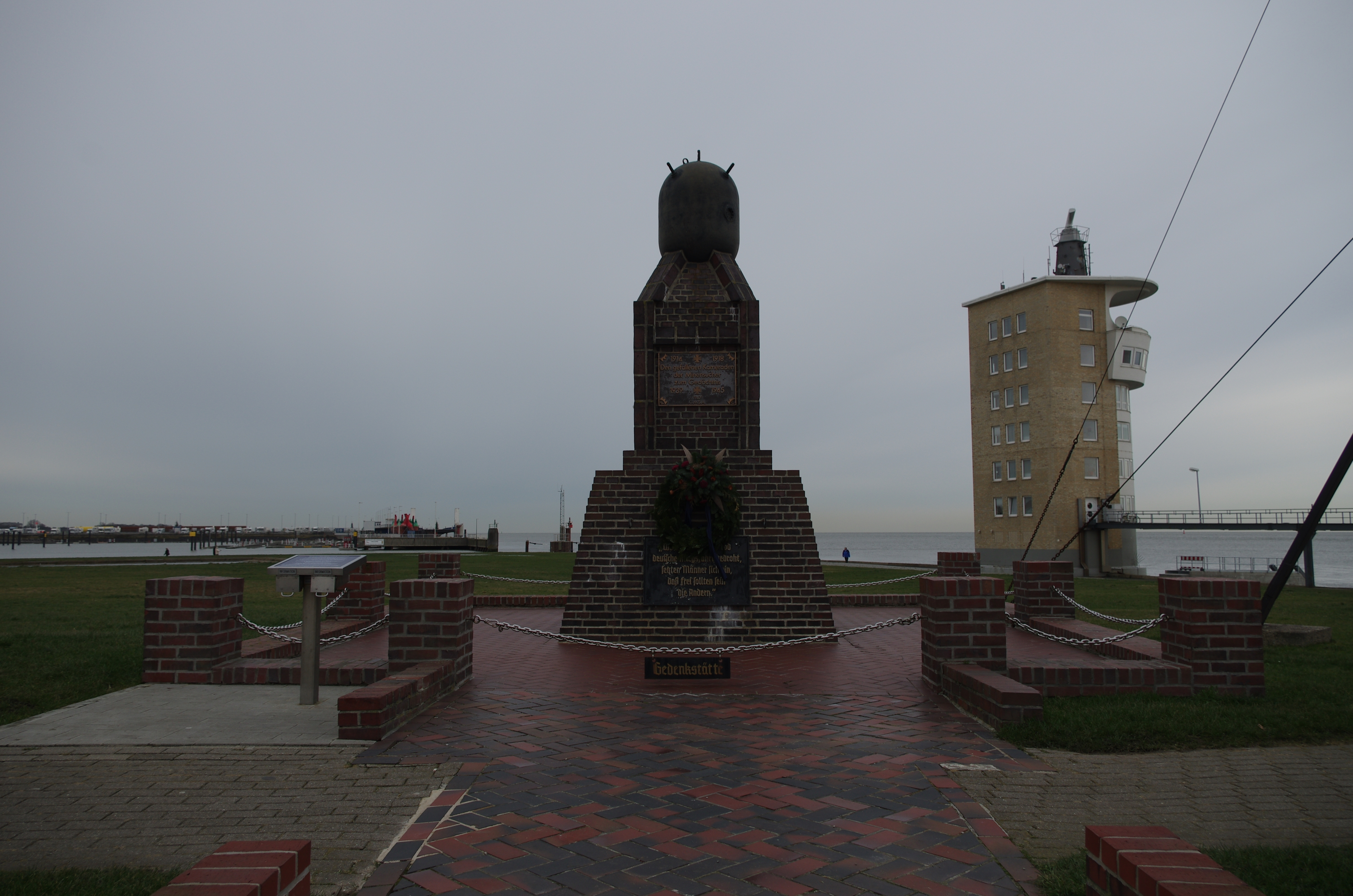 Cuxhaven in Niedersachsen. Das Minensucherdenkmal steht in der Straße Bei der Alten Liebe und steht unter Denkmalschutz.